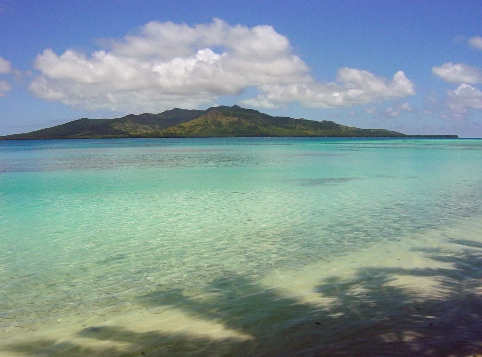 Vue de l'île de Tubuai depuis un îlot